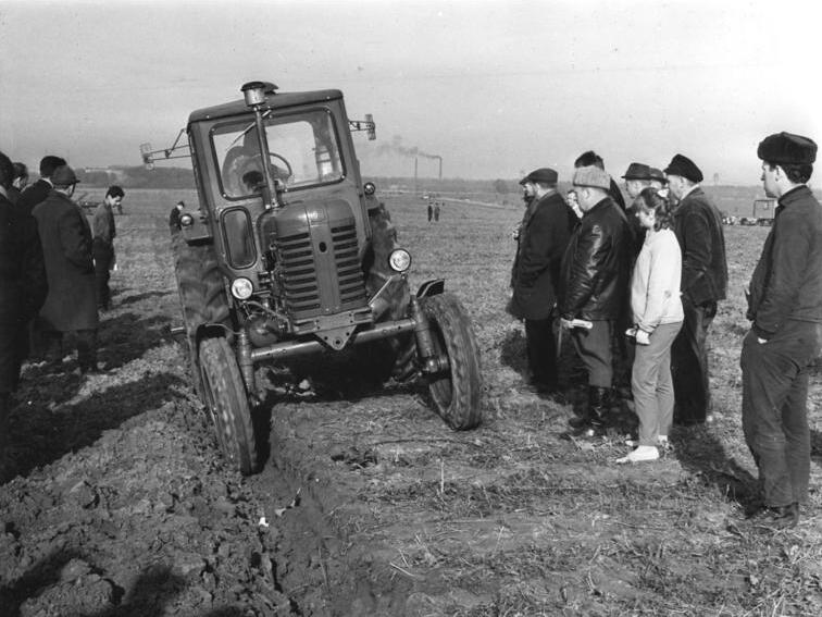 Vorführung eines sowjetischen Schleppers Zentralbild Krueger B-Wo. 6.11.1966 Berlin: MTS 50 Ein sowjetischer Traktor der 1, 4 Mp-Klasse, der noch in diesem Jahr in größerer Stückzahl in den Berliner Landwirtschaftsbetrieben zum Einsatz kommen wird.